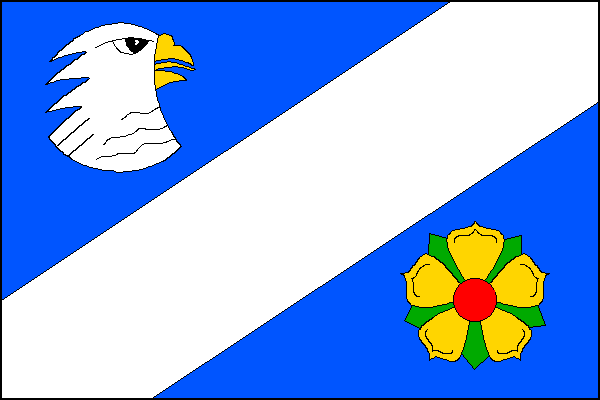 Vlajka,Linhartice , okres Svitavy